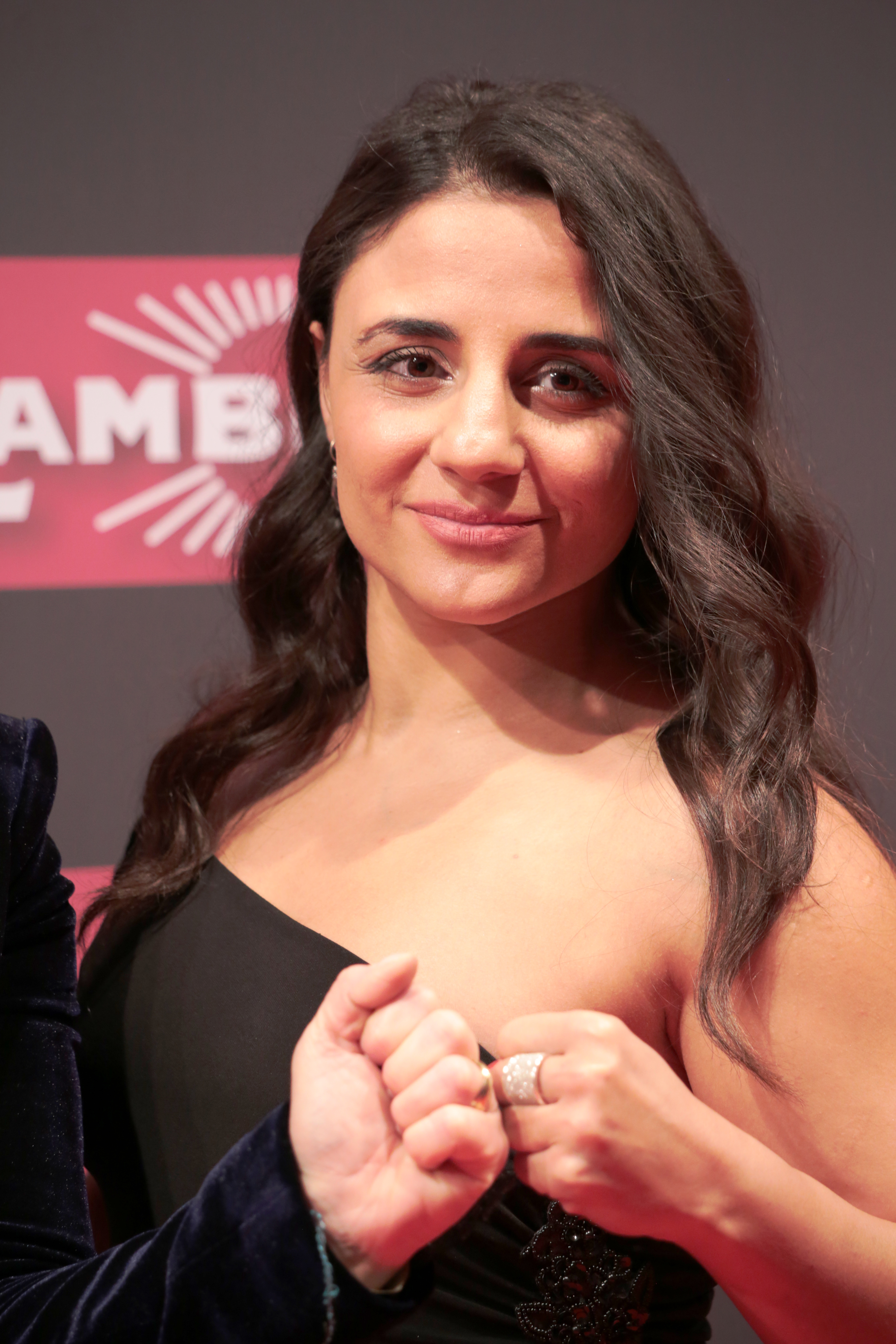 Susianna Kentikian bei der Lambertz Monday Night 2018.